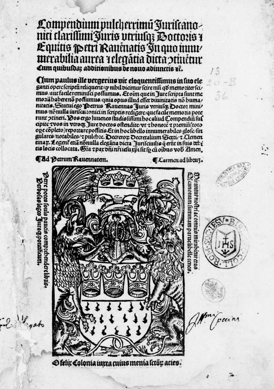 Frontespizio